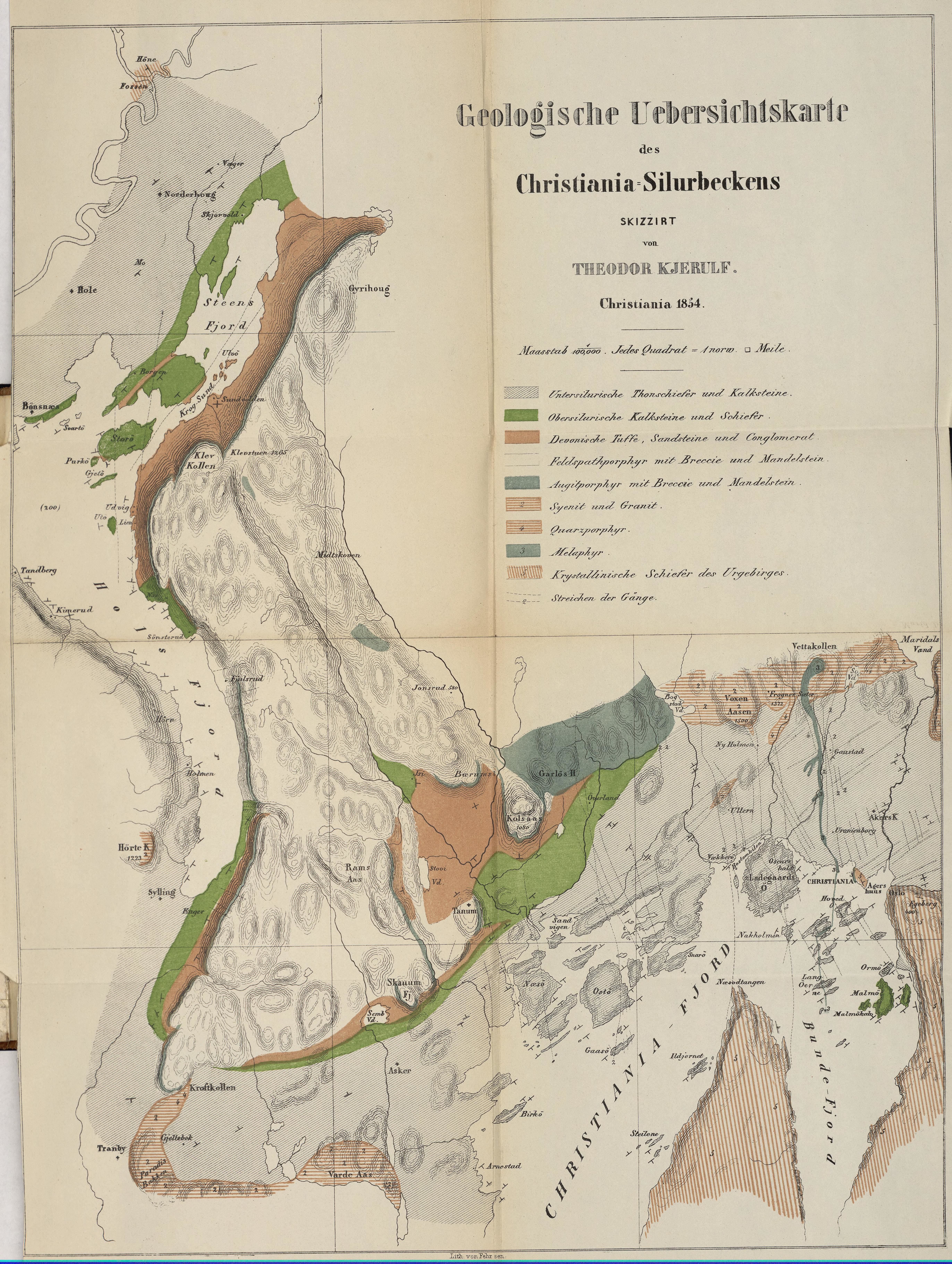 Geologische Uebersichtskarte des Christiania-Silurbeckens, fra Theodor Kjerulf: Das Christiania-Silurbecken, 1855